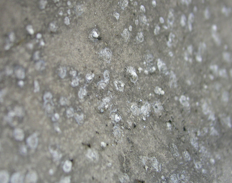 Piquration d'un alliage d'aluminium de la famille des 7000